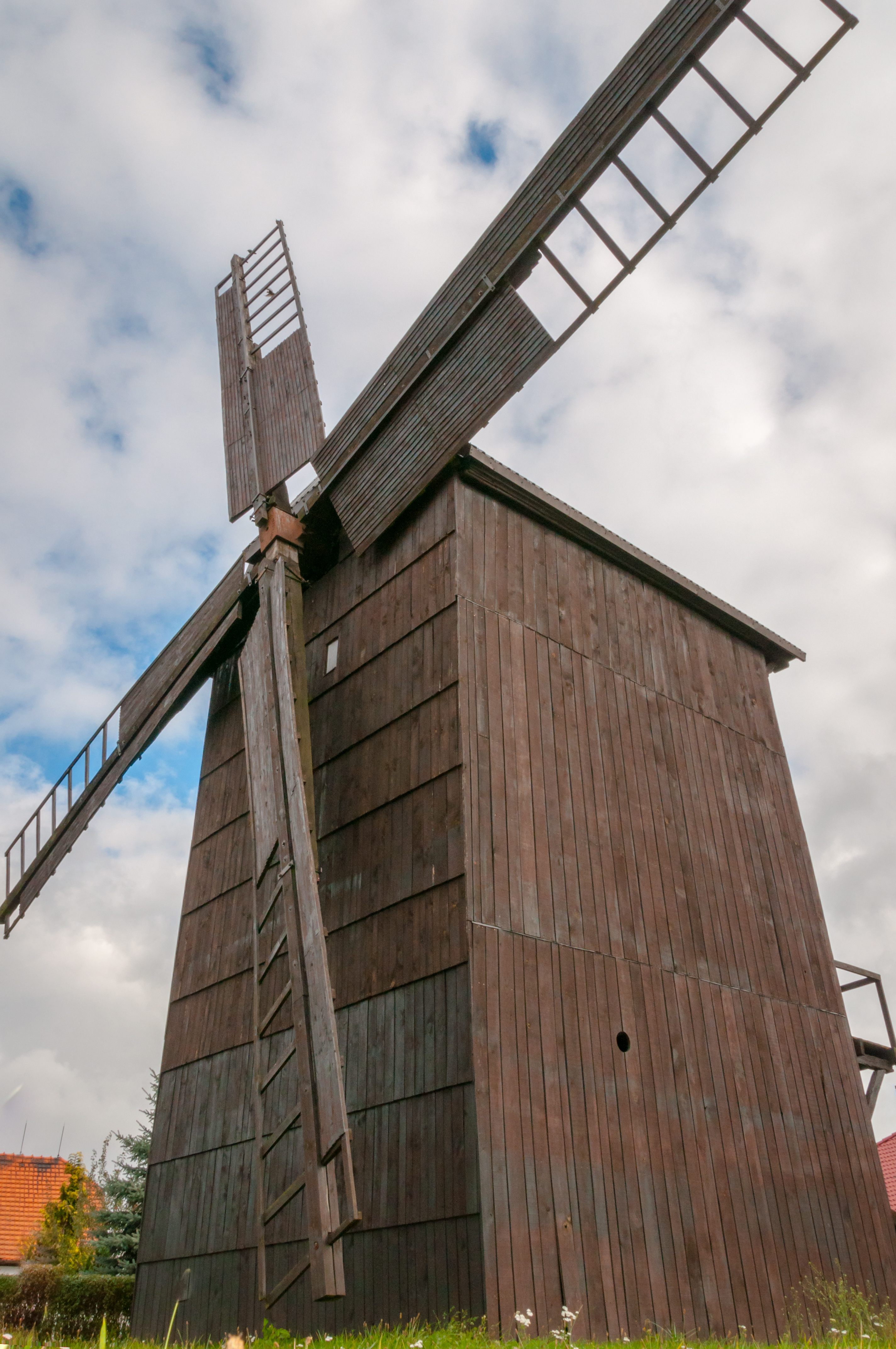 Koźmin Wielkopolski, wiatrak koźlak, 1868